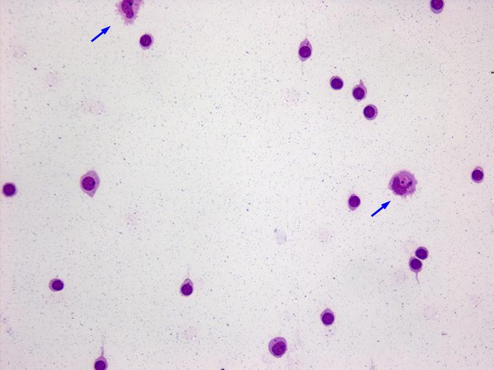 Hochgradige lymphozytäre Pleozytose bei Herpes-simplex-Enzephalitis mit Nachweis von HSV1-Genom in der PCR. Beachte einzelne Siderophagen (Pfeile). Pappenheim-Färbung. Vergrößerung 200x